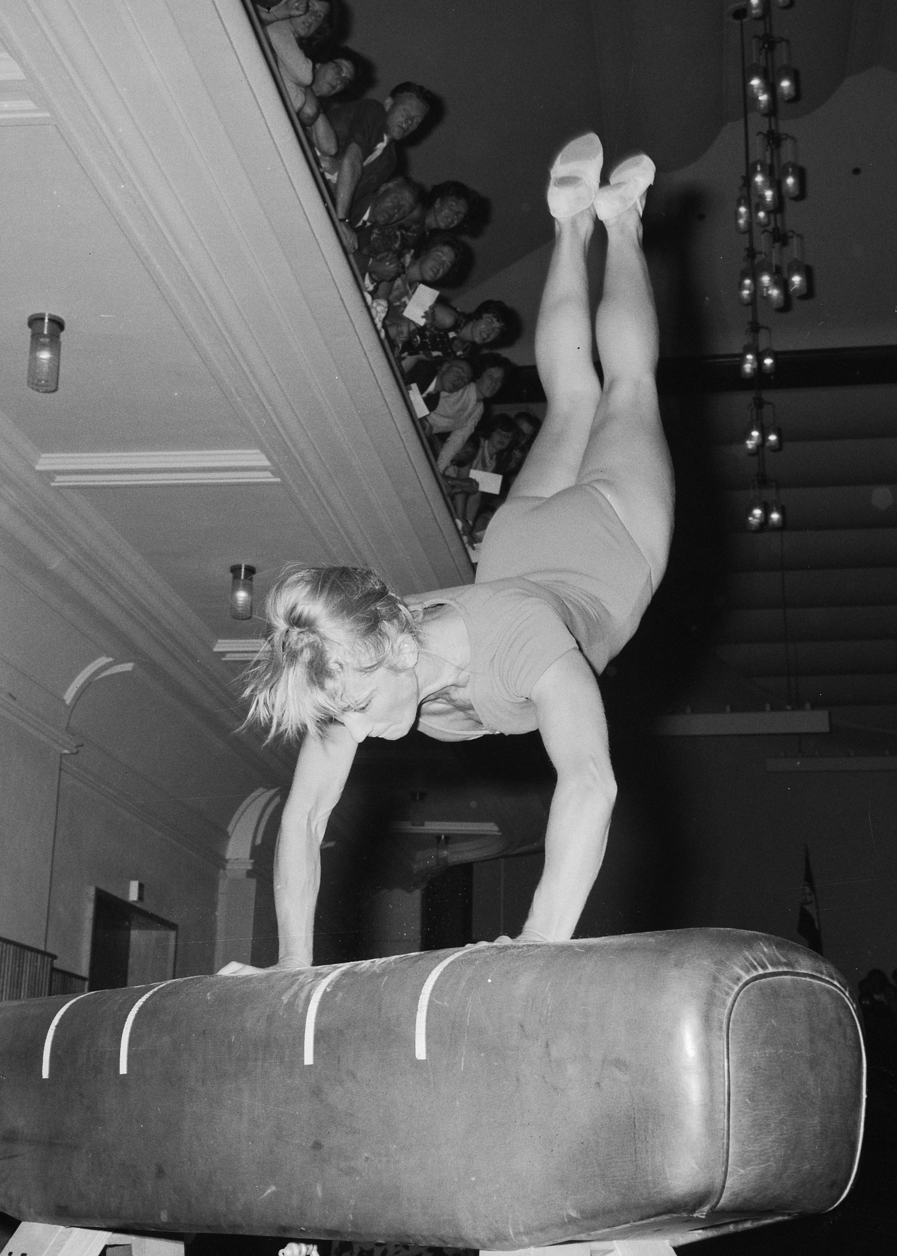 Turnen Nederland tegen Roemenië, dames, de kampioene van Roemenië Sonia Iovan in aktie op het paard